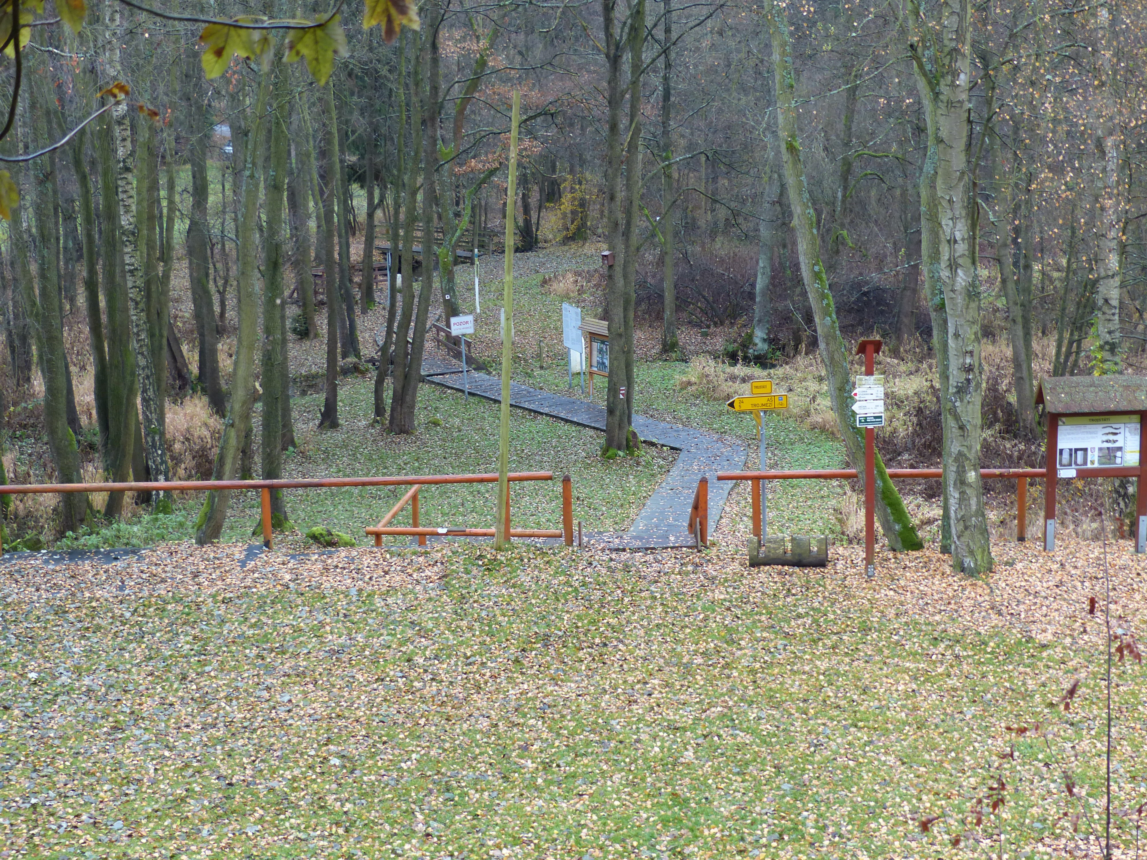 Dreiländereck